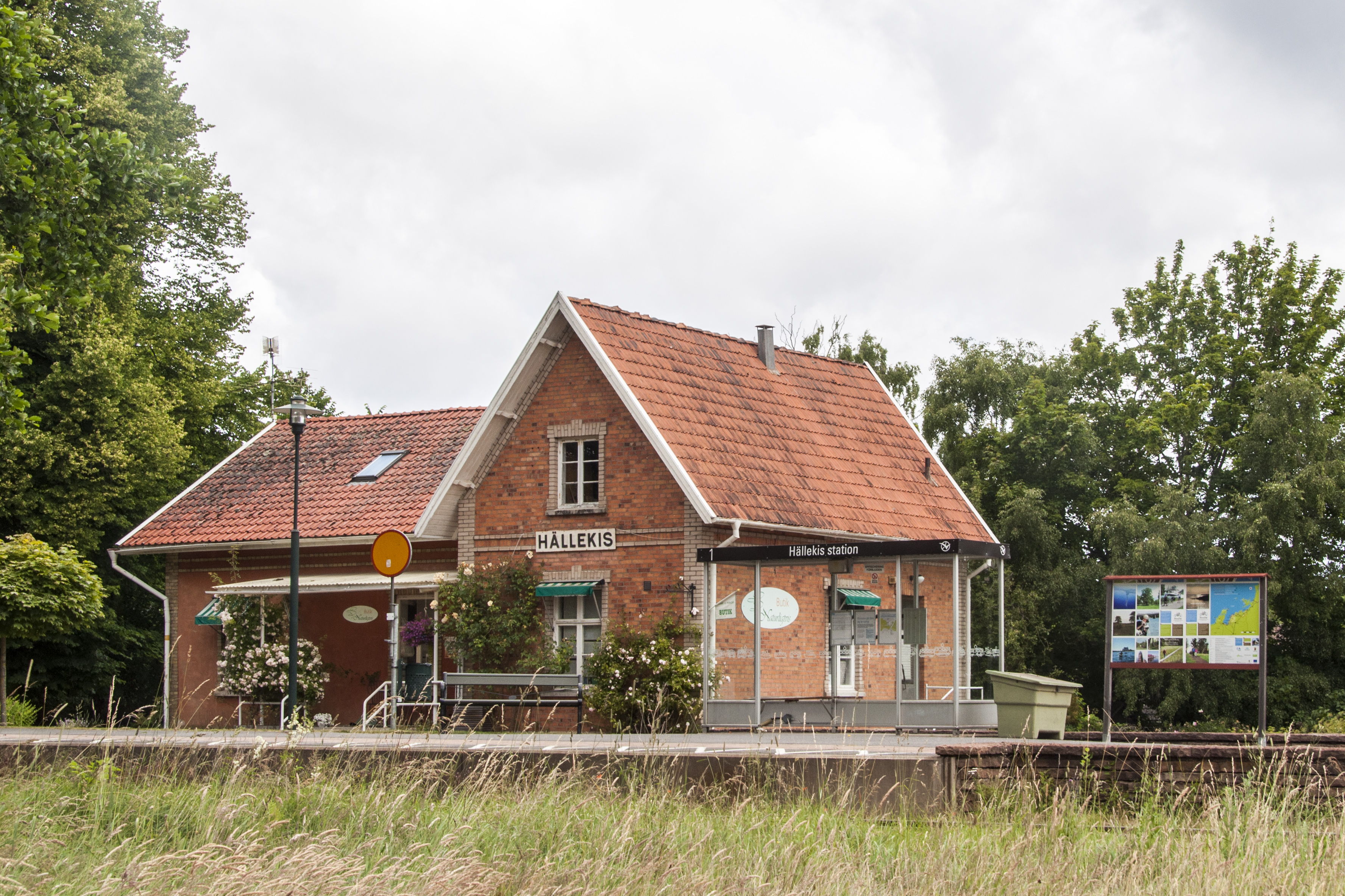 Hällekis station, Byggnadsår 1898